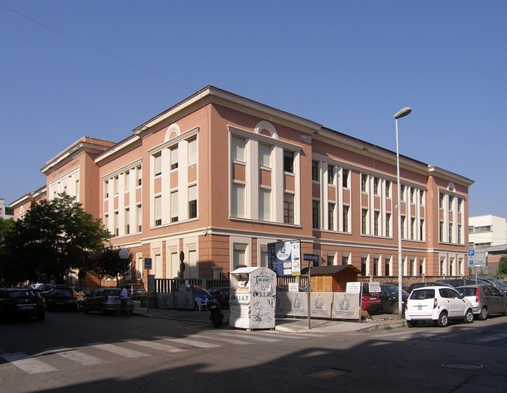 Pescara